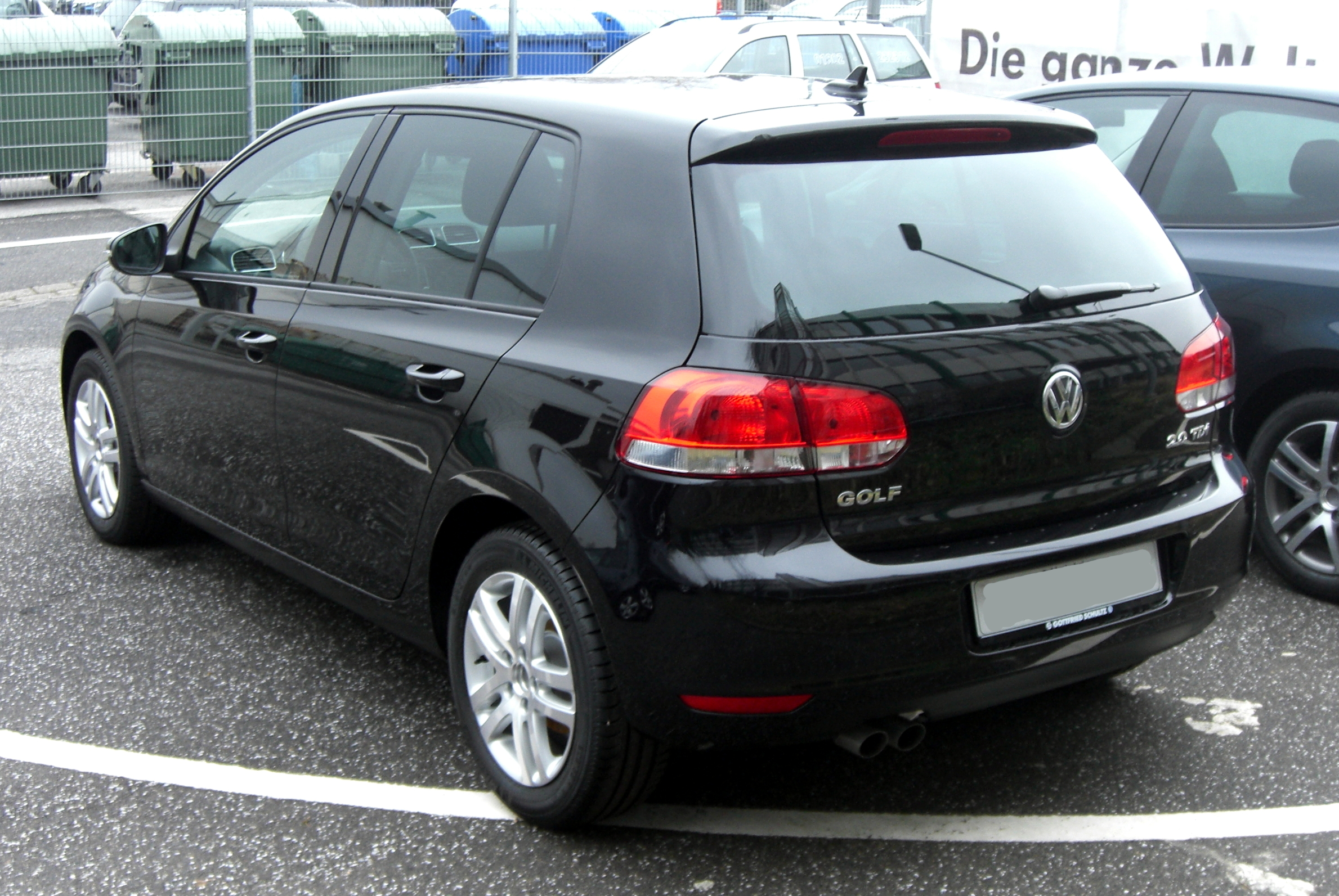 VW GOLF